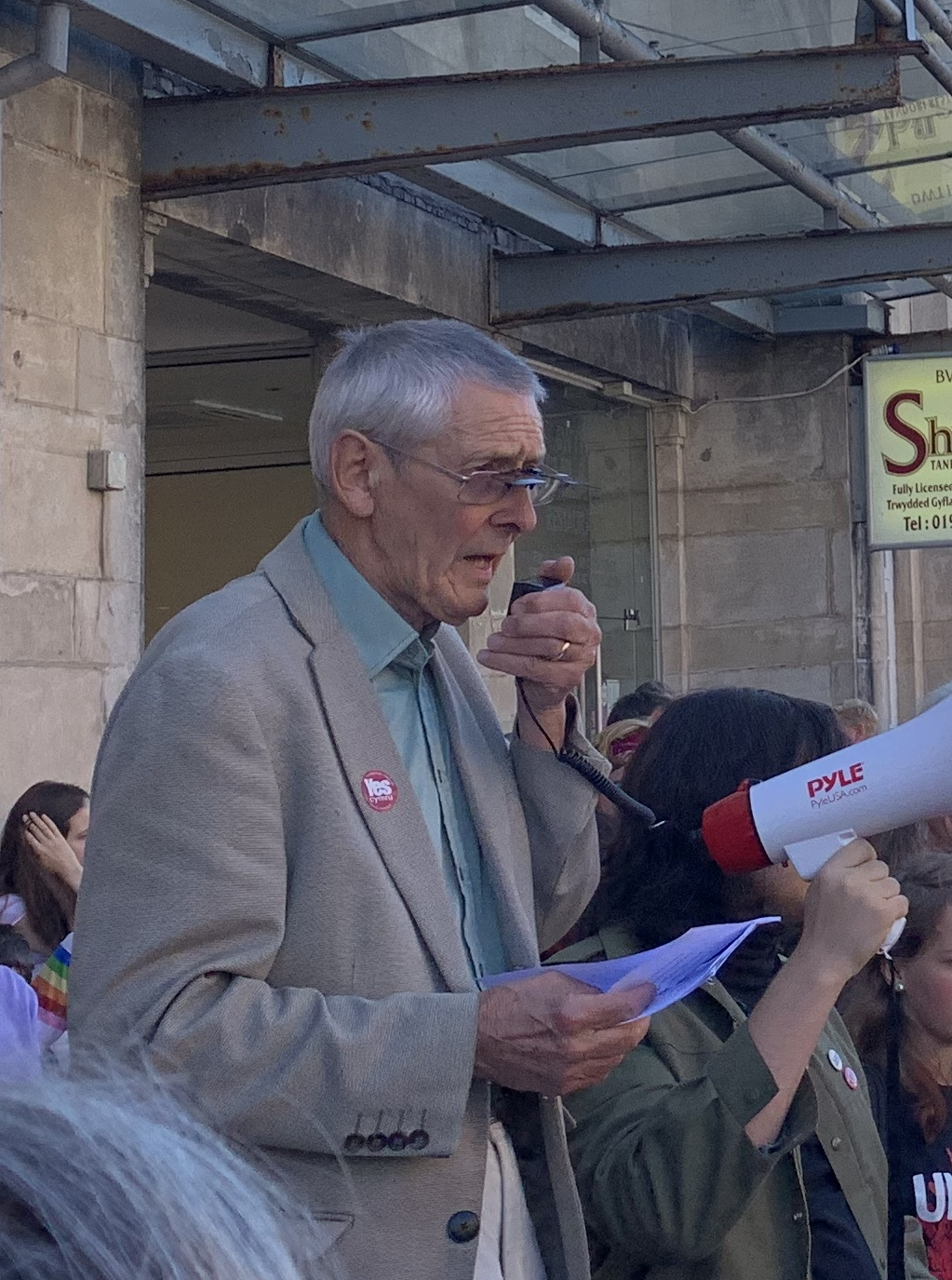 Cynog Dafis yn annerch y dorf Climate Strike, Aberystwyth